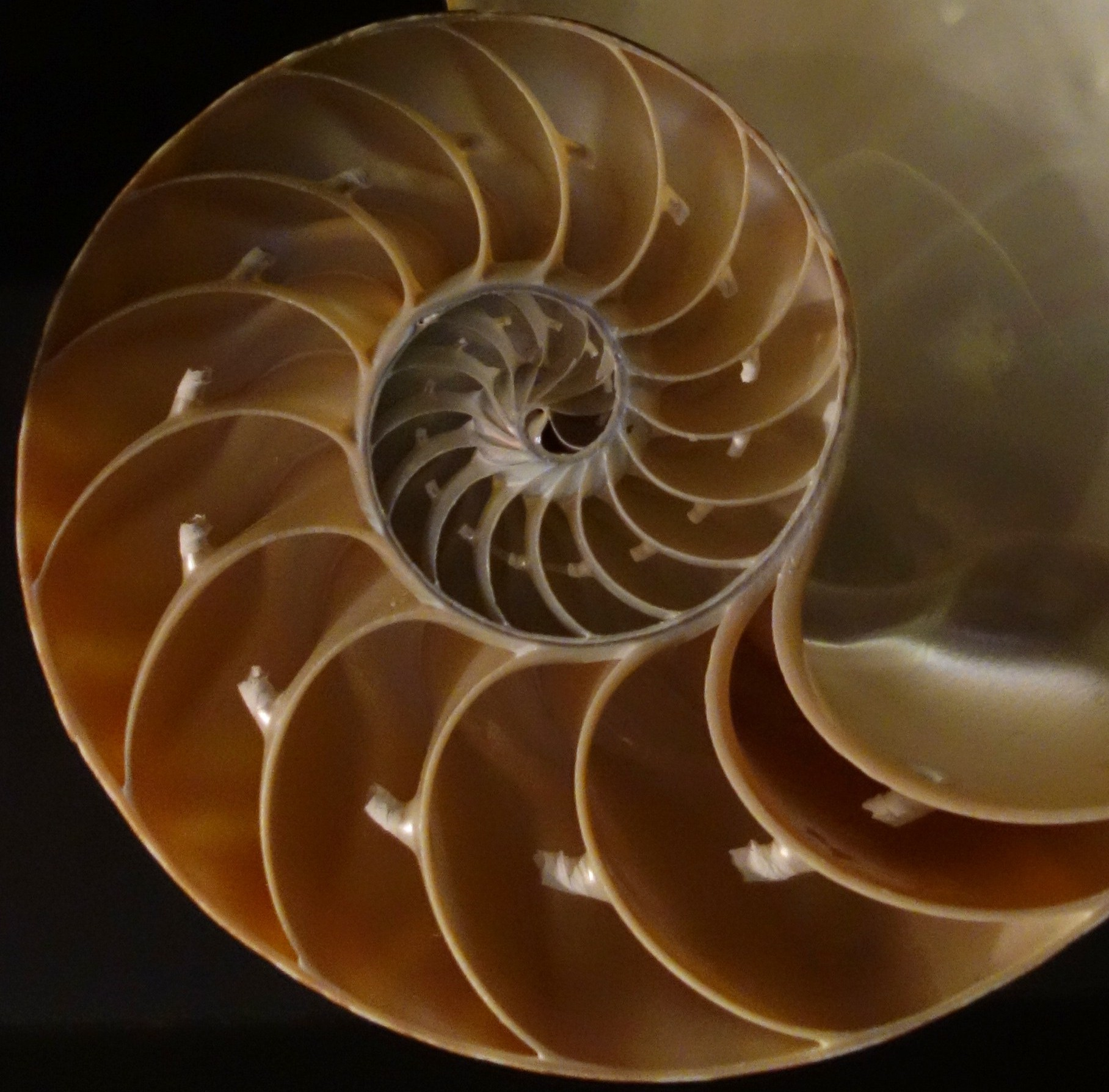 Macro-opname